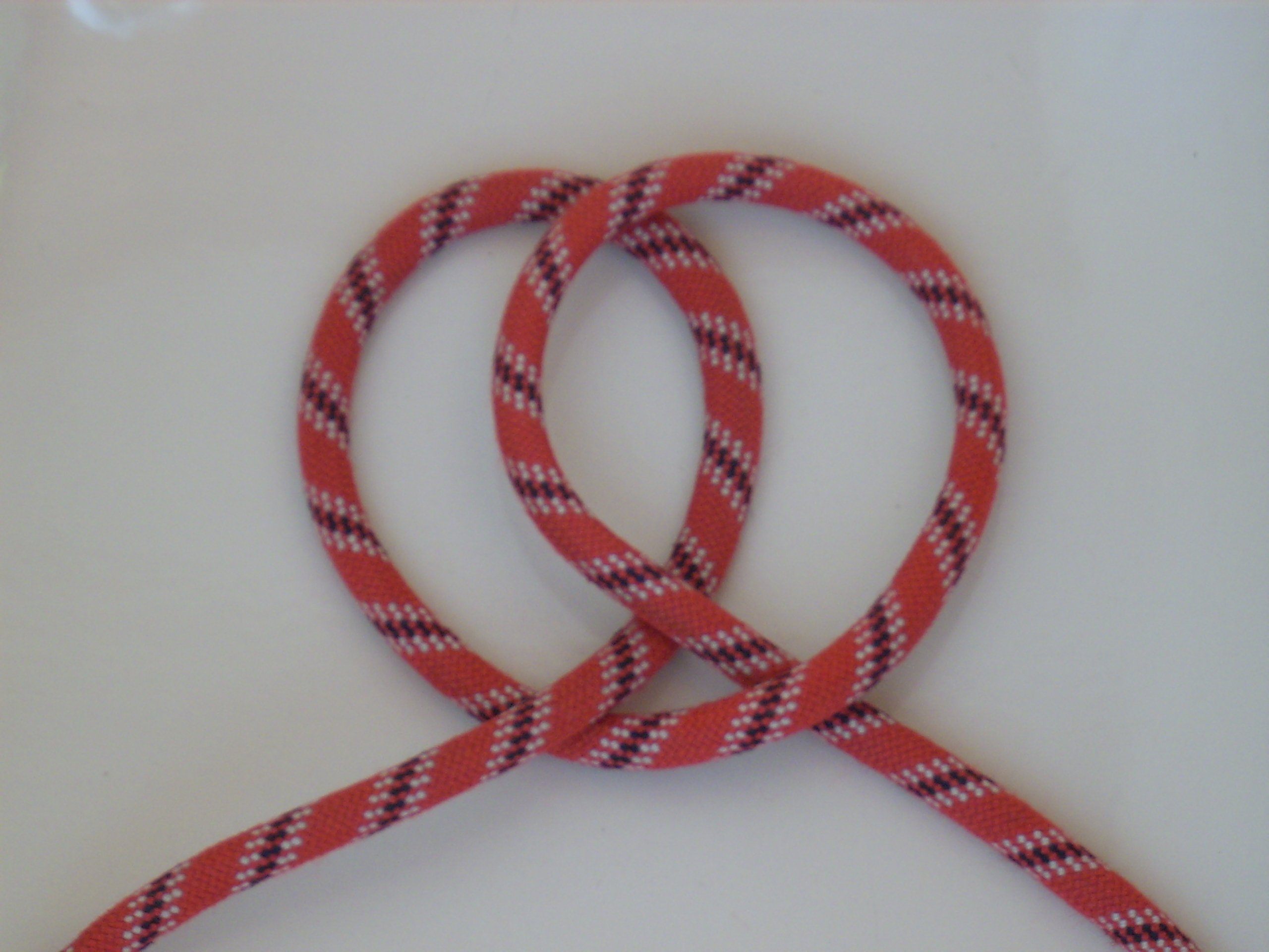 Webeleinenstek gelegt